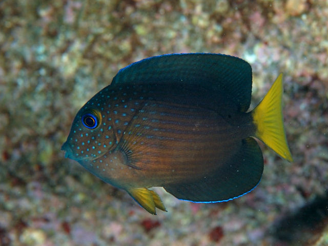 コクテンサザナミハギ Ctenochaetus binotatus